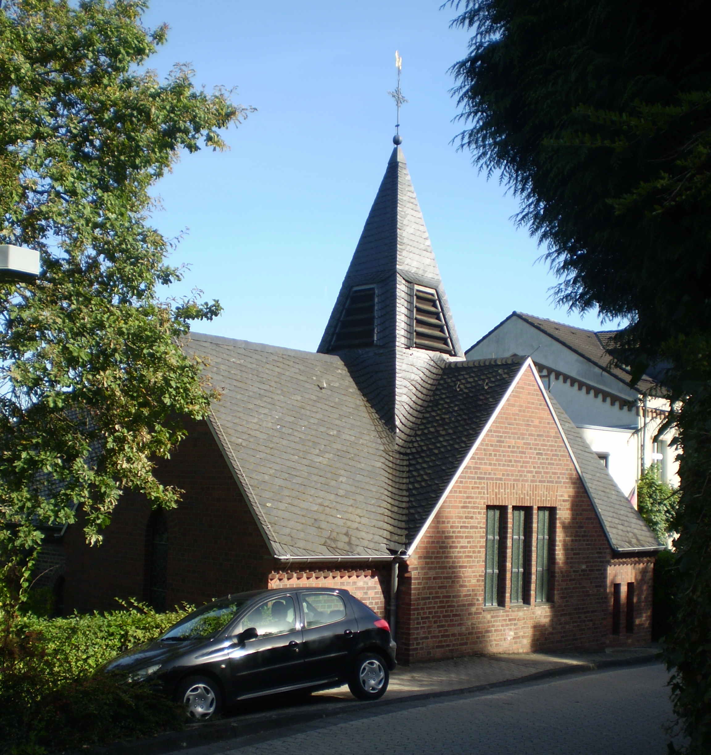 Katholische Kapelle Mariä Unbefleckte Empfängnis, Rolandswerth: Ansicht von der Straße Marienhöhe